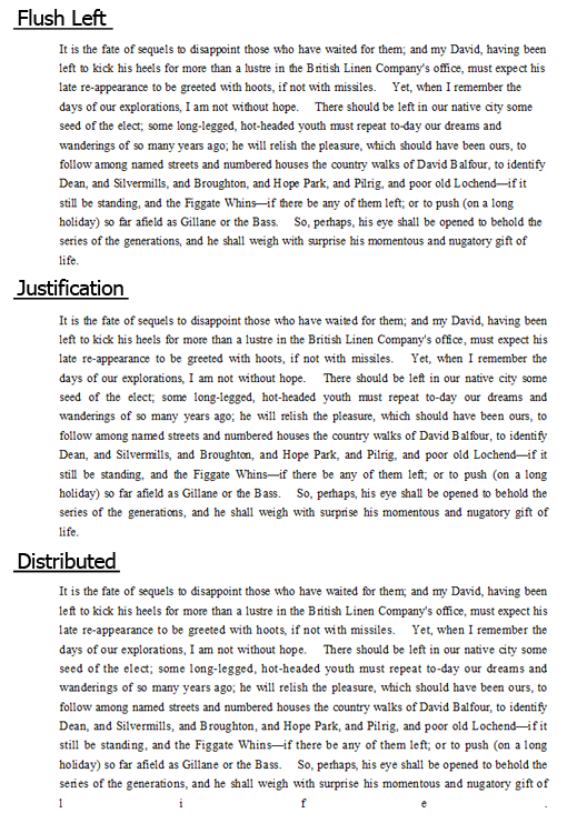 上から左揃え／両端揃え／均等割付